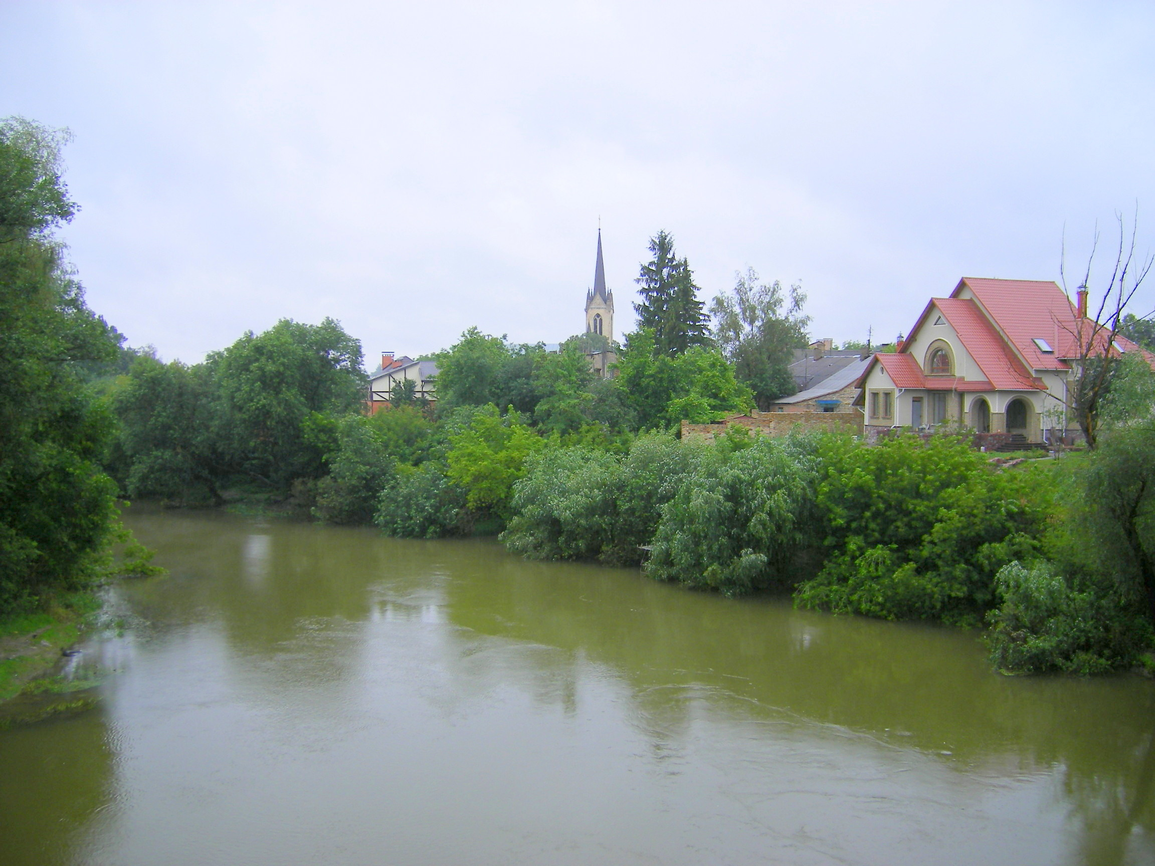 Lutsk, Styr River